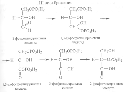 1,3 дифосфоглицериновая кислота в процессе брожения